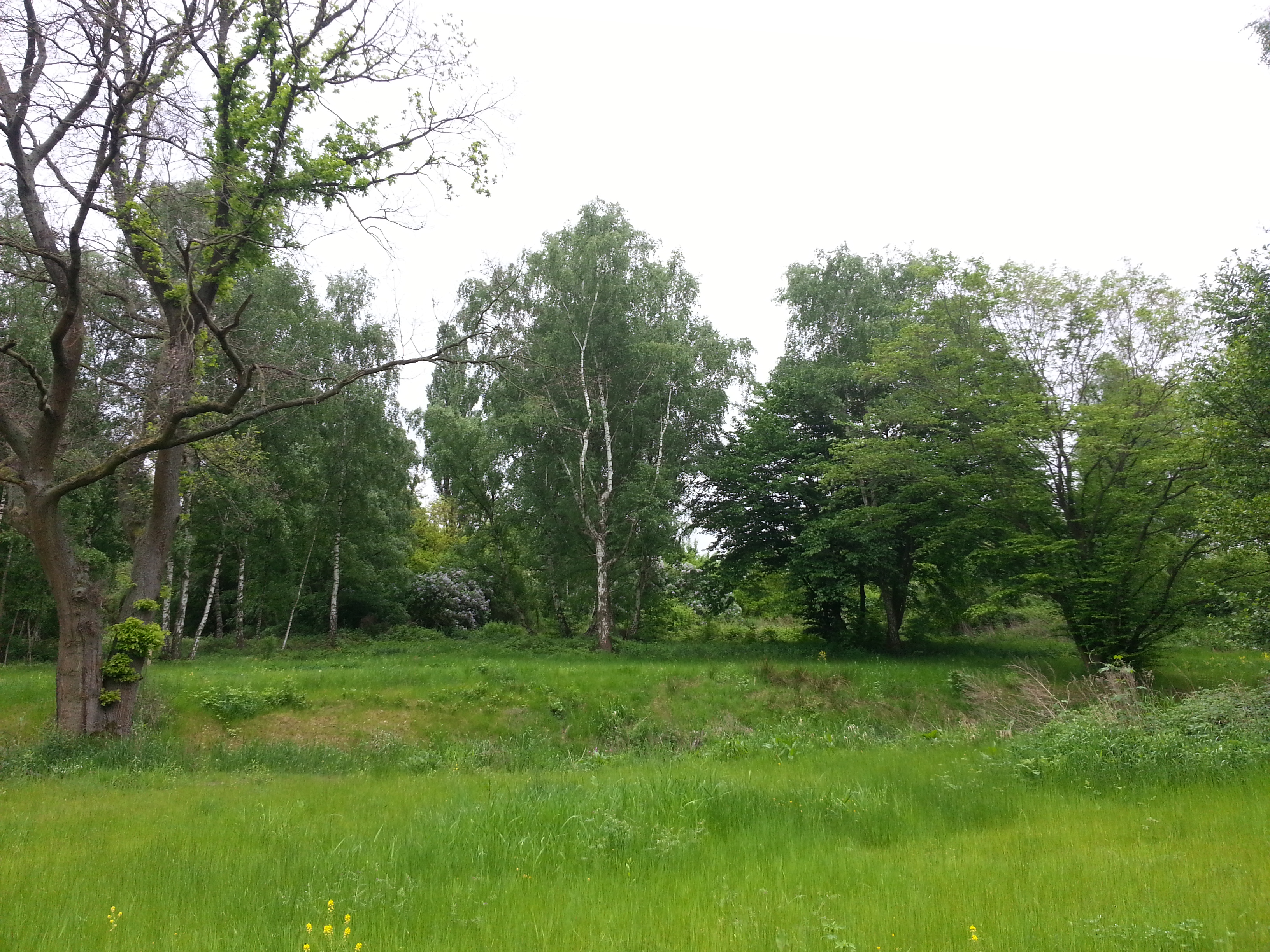 Sichtbare Bodenvertiefung im Wissenschafts- und Technologiepark (WTH) Marienwerder